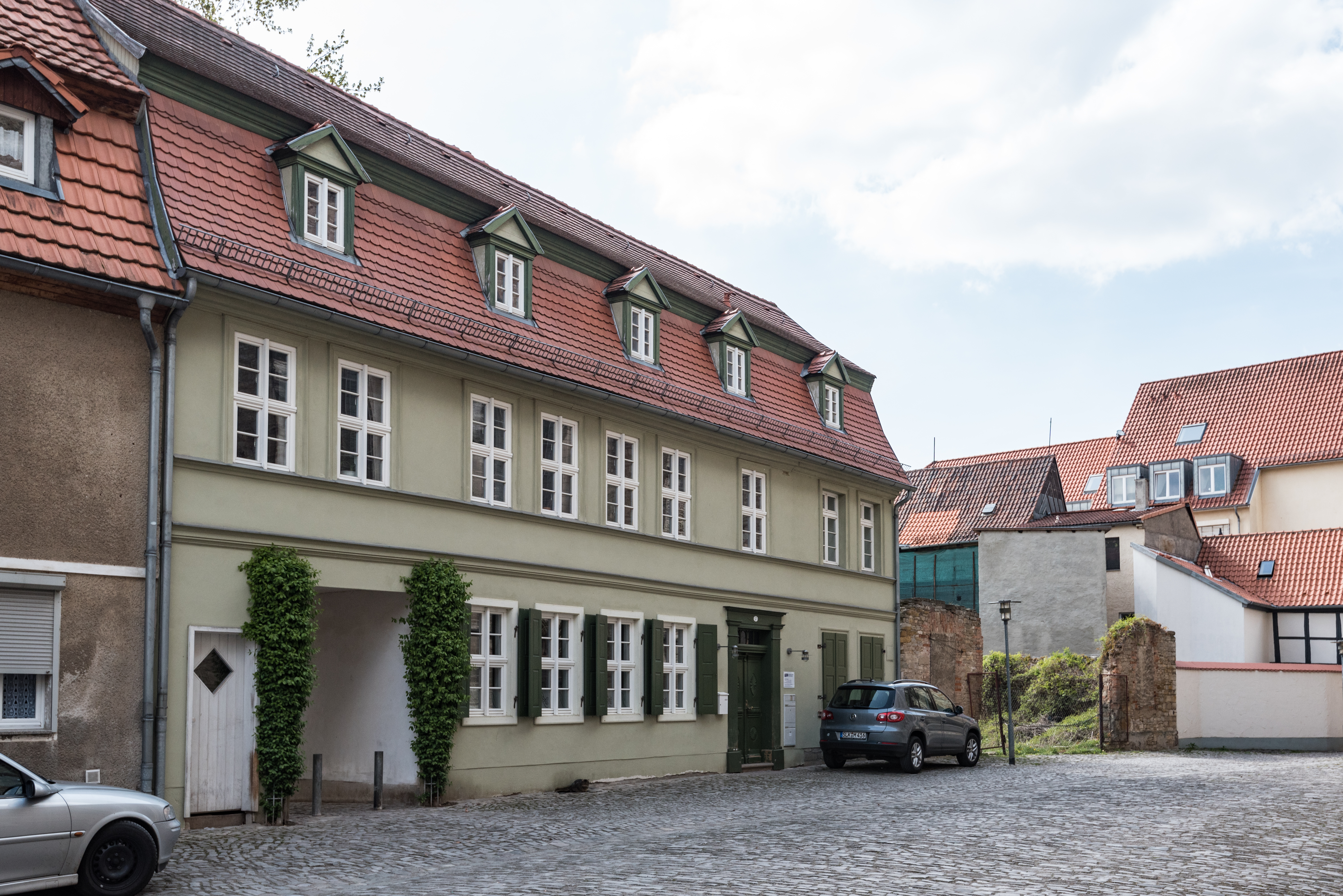 Aschersleben, Stephanikirchhof 5